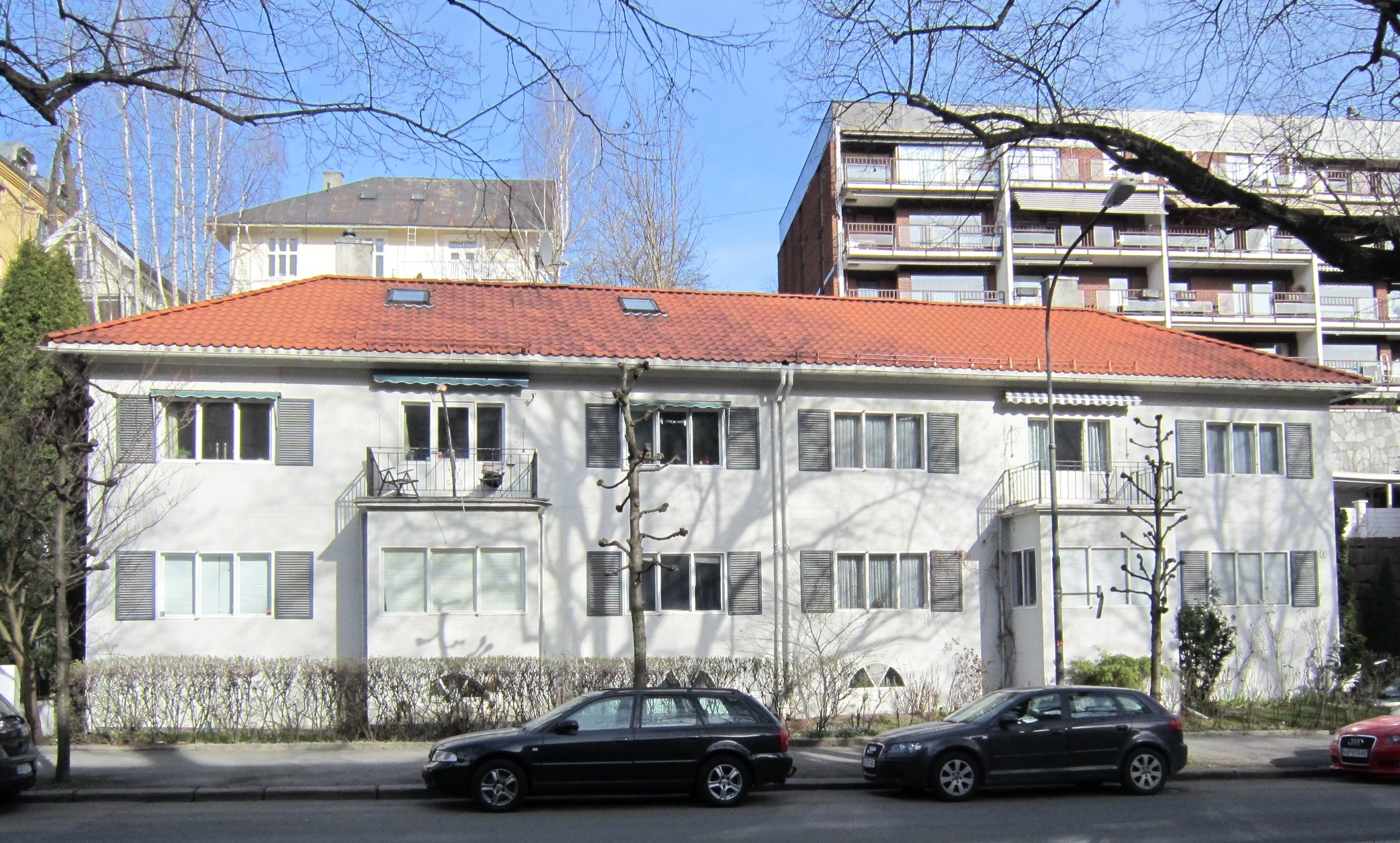 Gyldenløves gate 1C–3 (ark. Mads Wiel Gedde)